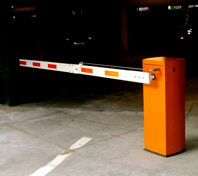 Sluitlus